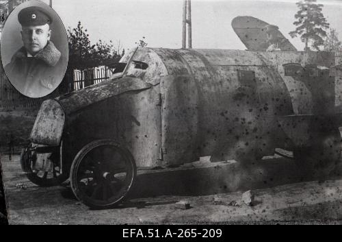 Pärnu Ühistöö poolt insener Järatsi juhtimisel ehitatud soomusauto Vanapagan Vabadussõja ajal Rodenpoisis.